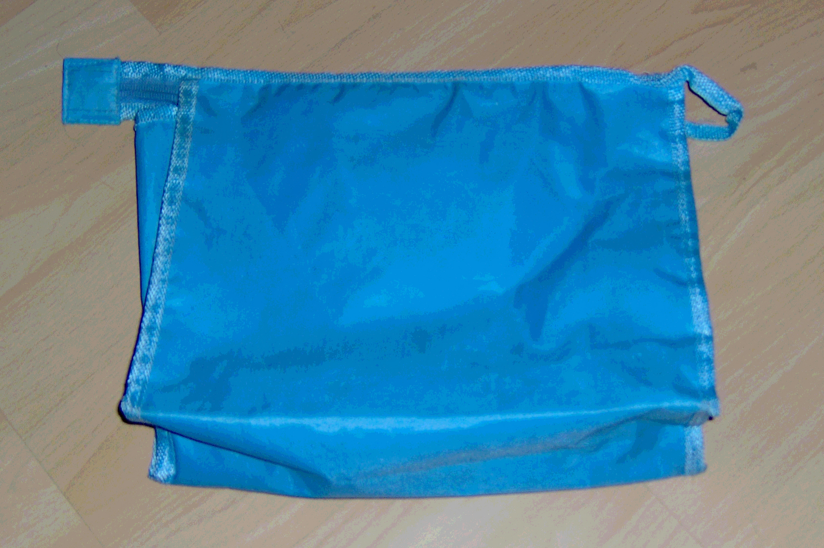 Simpele lichtblauwe toilettas, eigen werk.